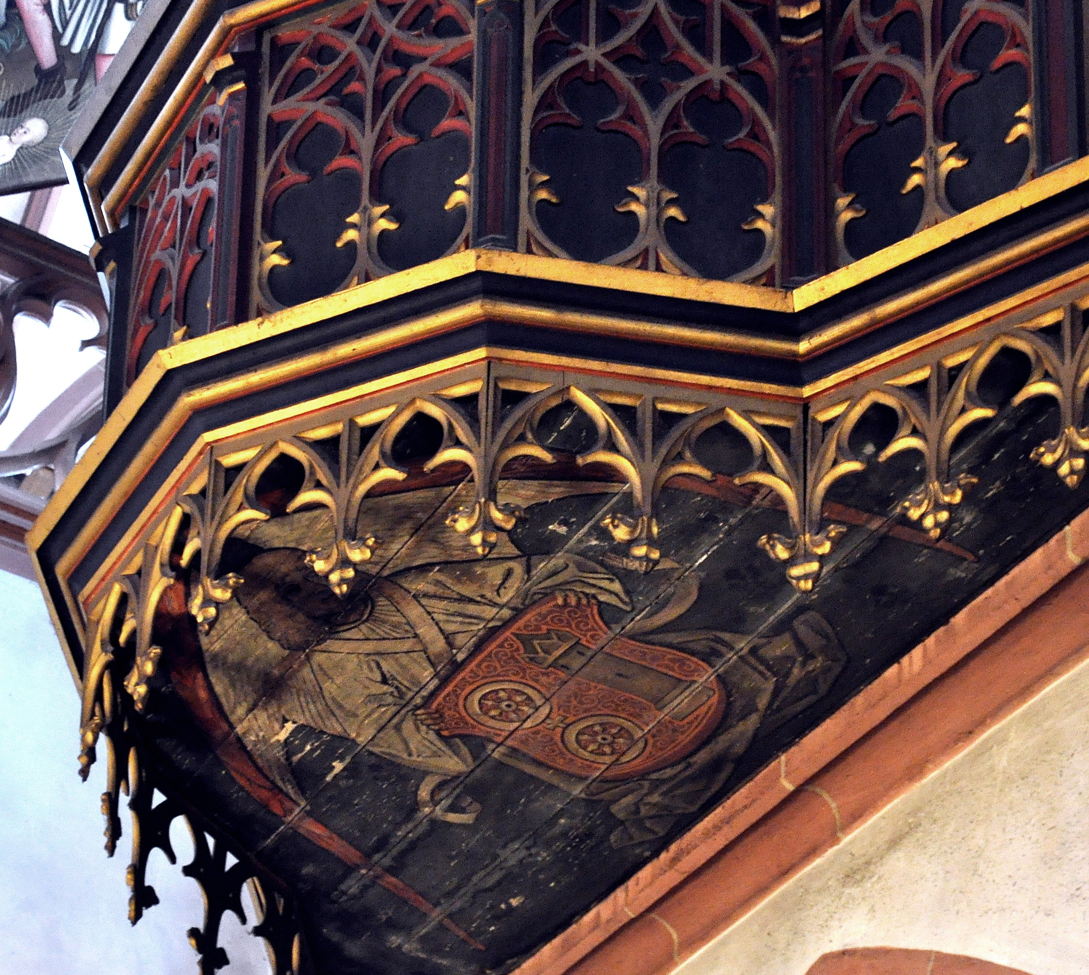 Kiedrich, Pfarrkirche St. Valentin, Gemeindewappen Kiedrich unter der Orgel